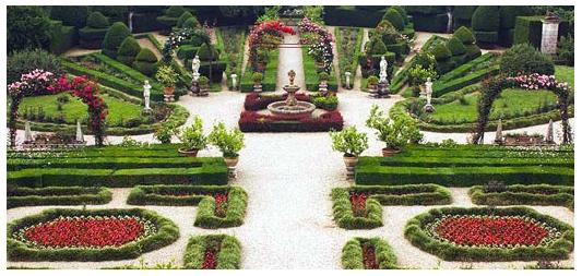 Parco